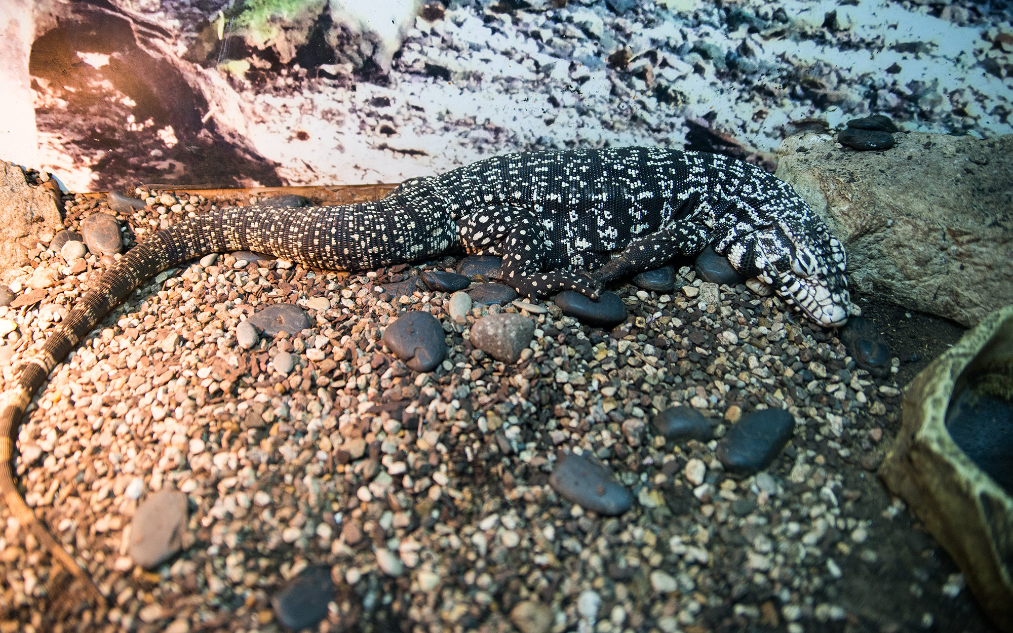 Тегу в Московском зоопарке